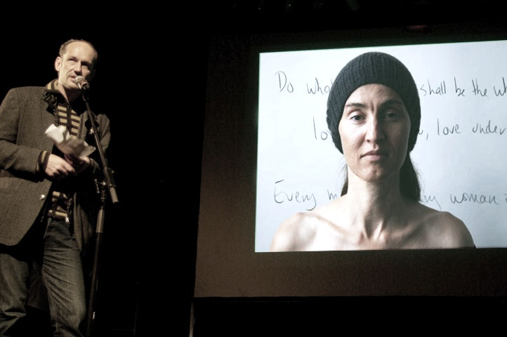 Johannes Gramm beim Vortrag 2012, im Hintergrund "Thelema - θέλημα / KB"